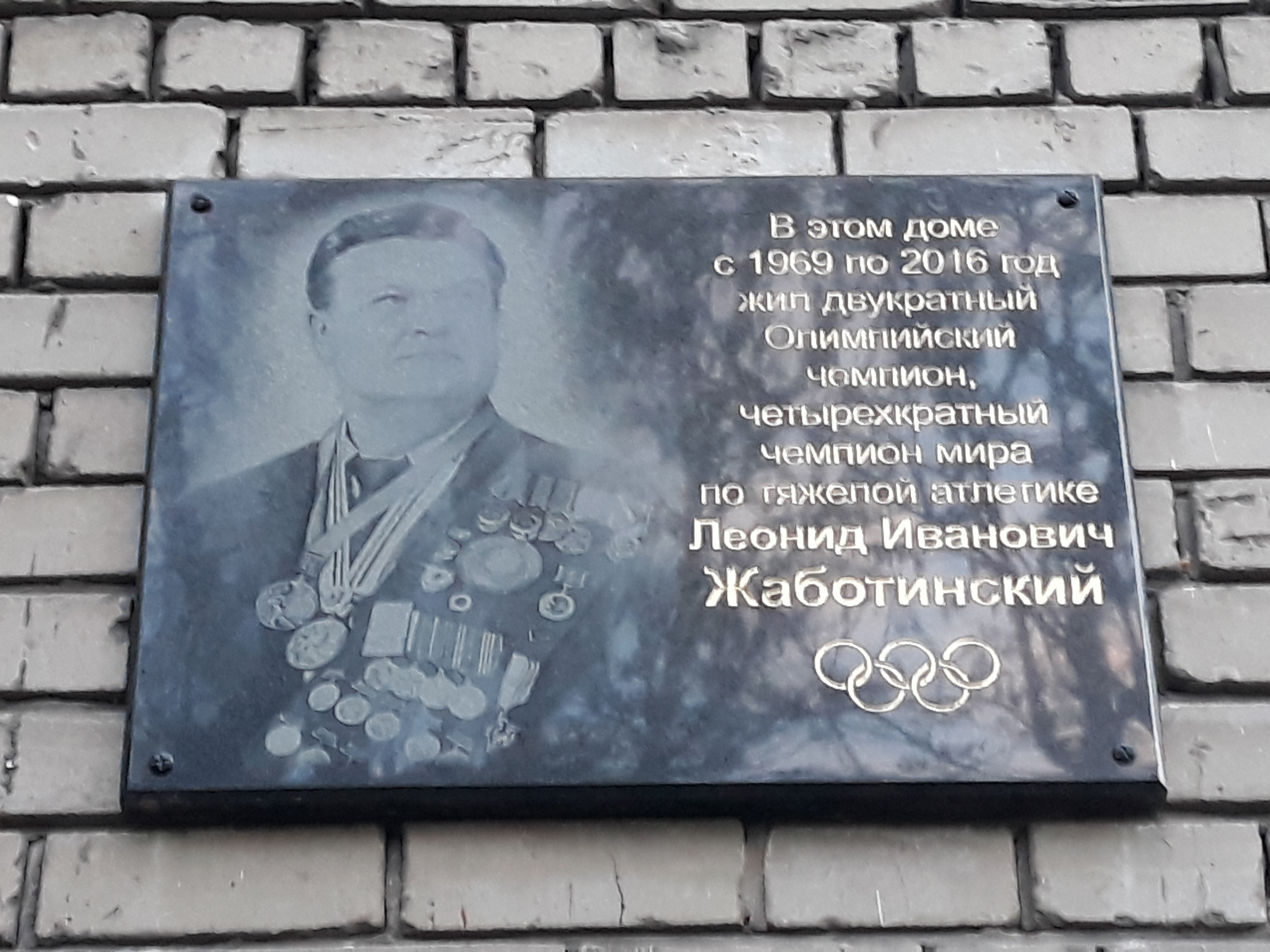 Памятная доска Леониду Жаботинскому в Запорожье по адресу: ул. Школьная, 15